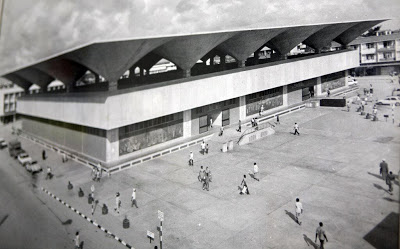 Kiswahili: Picha ya Kariakoo miaka ya 1970/1980